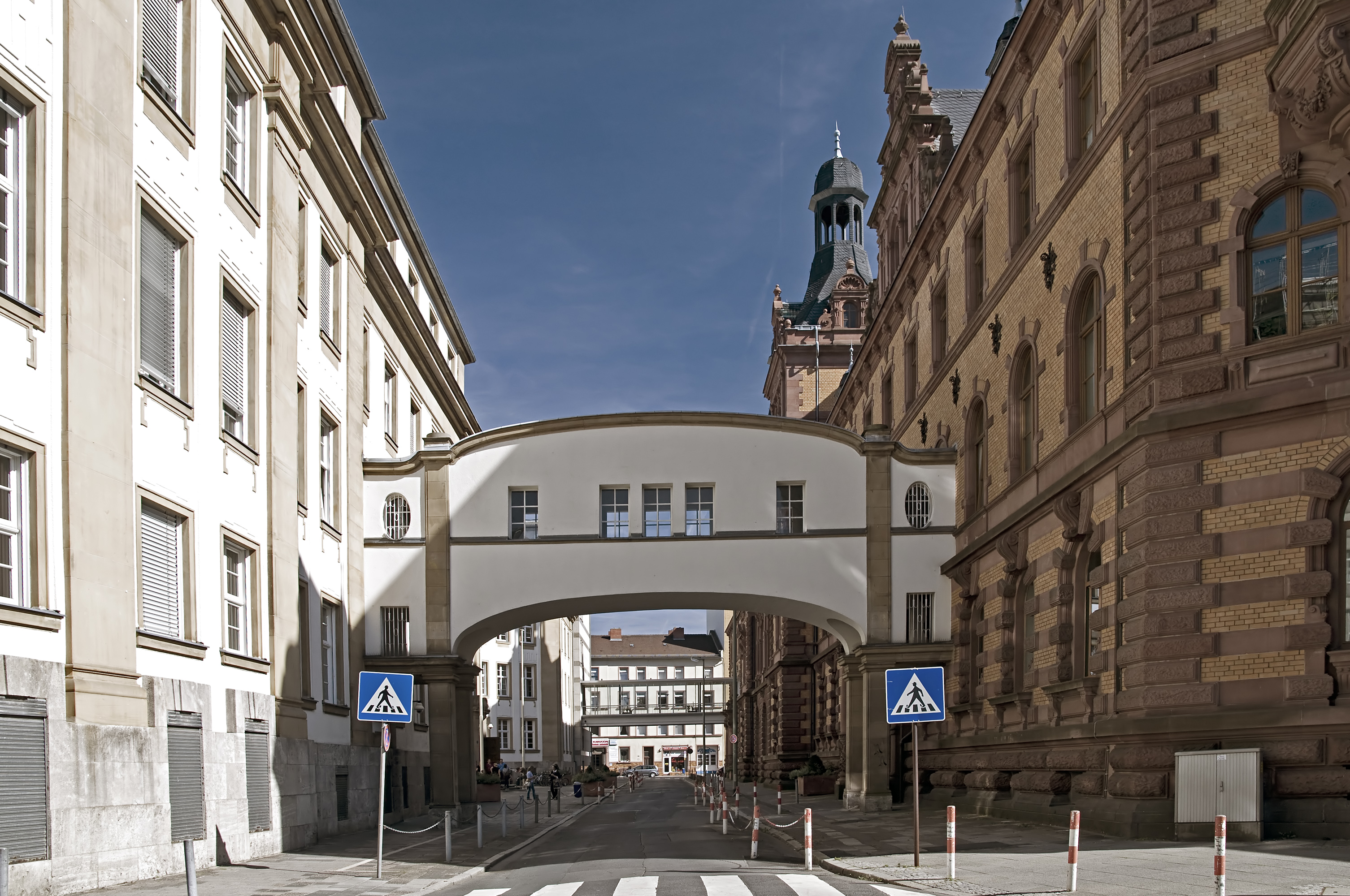 Gerichtsstraße in der Frankfurter Innenstadt mit Amts- und Landgericht. Links das Gerichtsgebäude B (Amtsgericht und Landgericht), rechts das Gerichtsgebäude A.